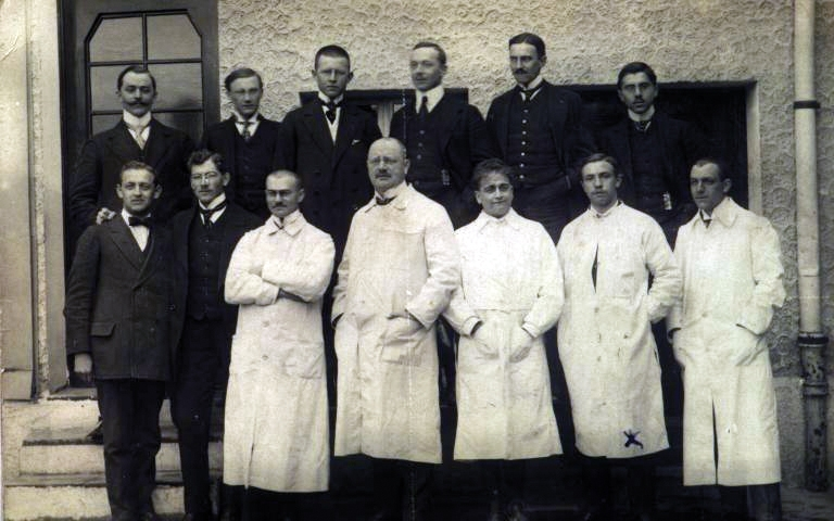 Cruz Gallastegi Hohenheimen, Alemanian